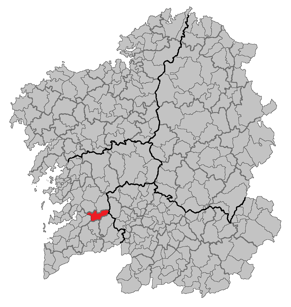 Mapa coa localización do concello de Fornelos de Montes.